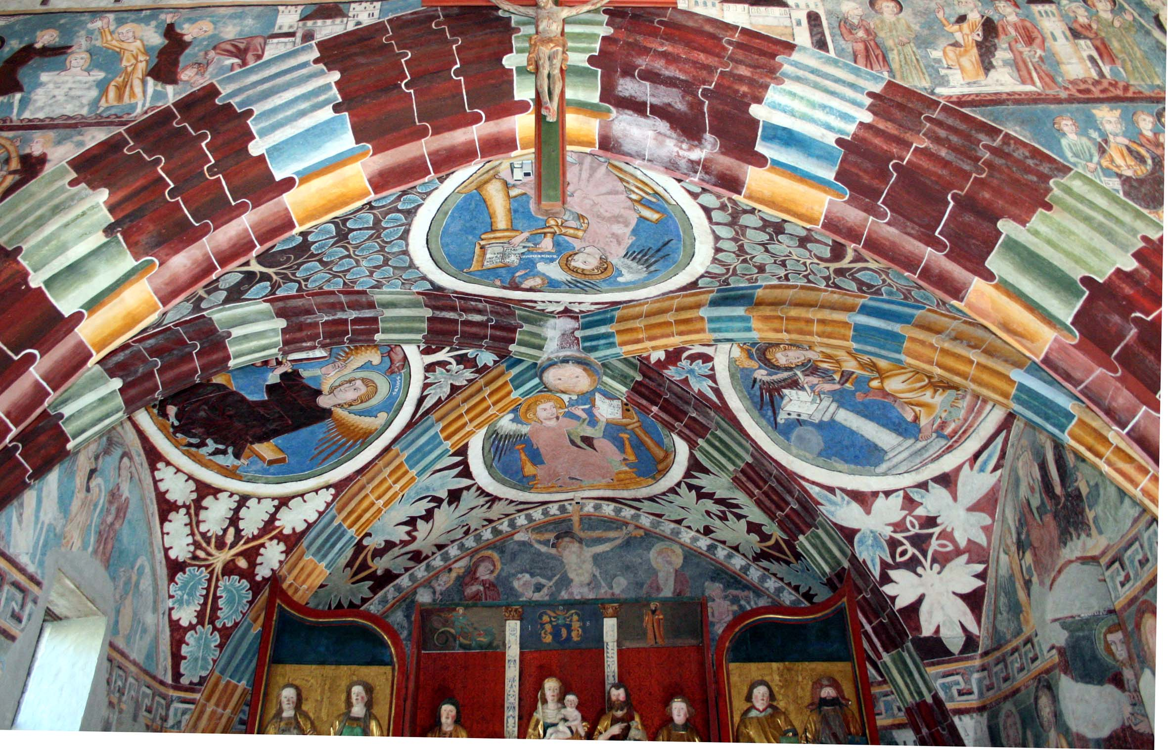 Chorhimmel mit den Evangelisten